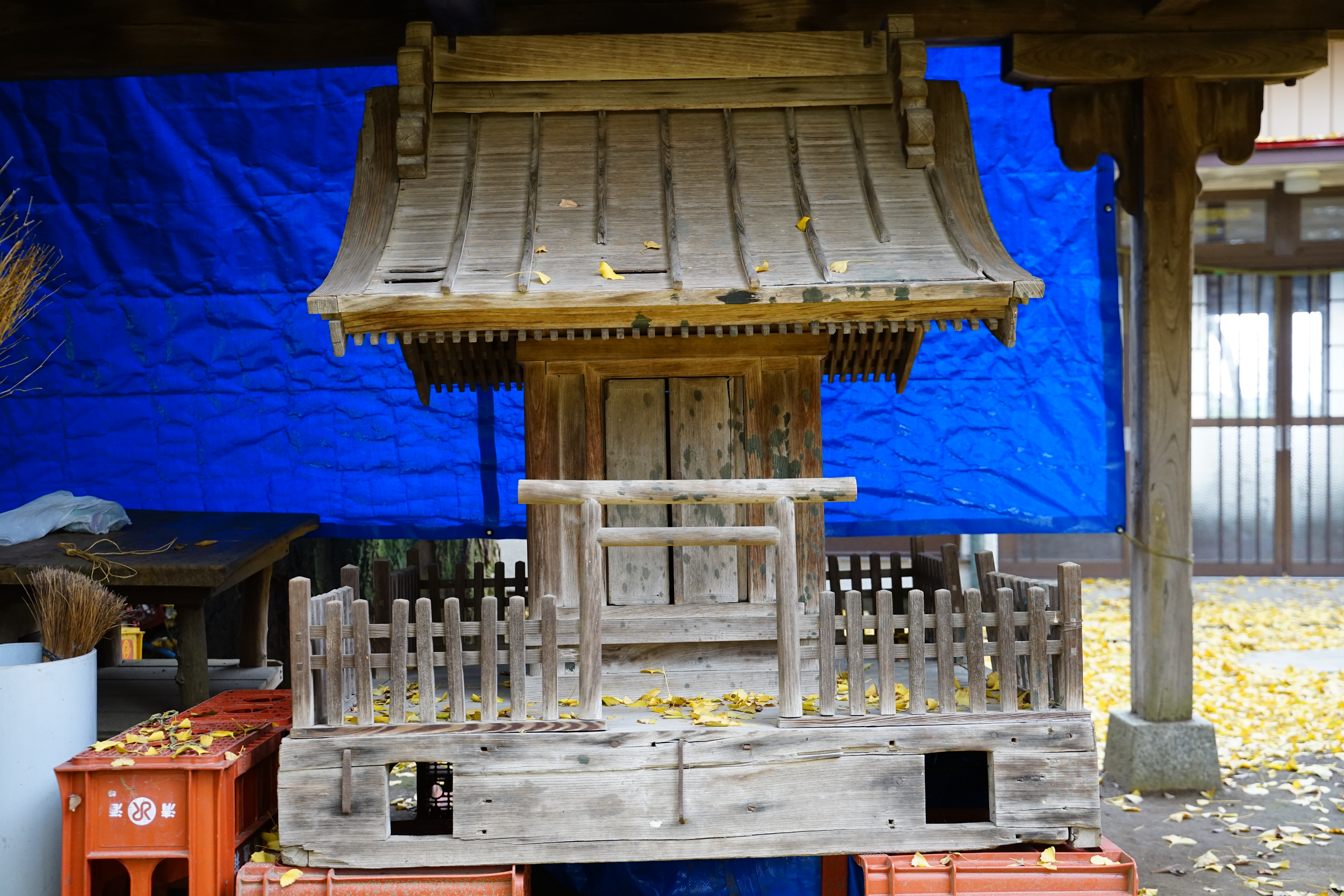 金村別雷神社の御神輿（茨城県つくば市）